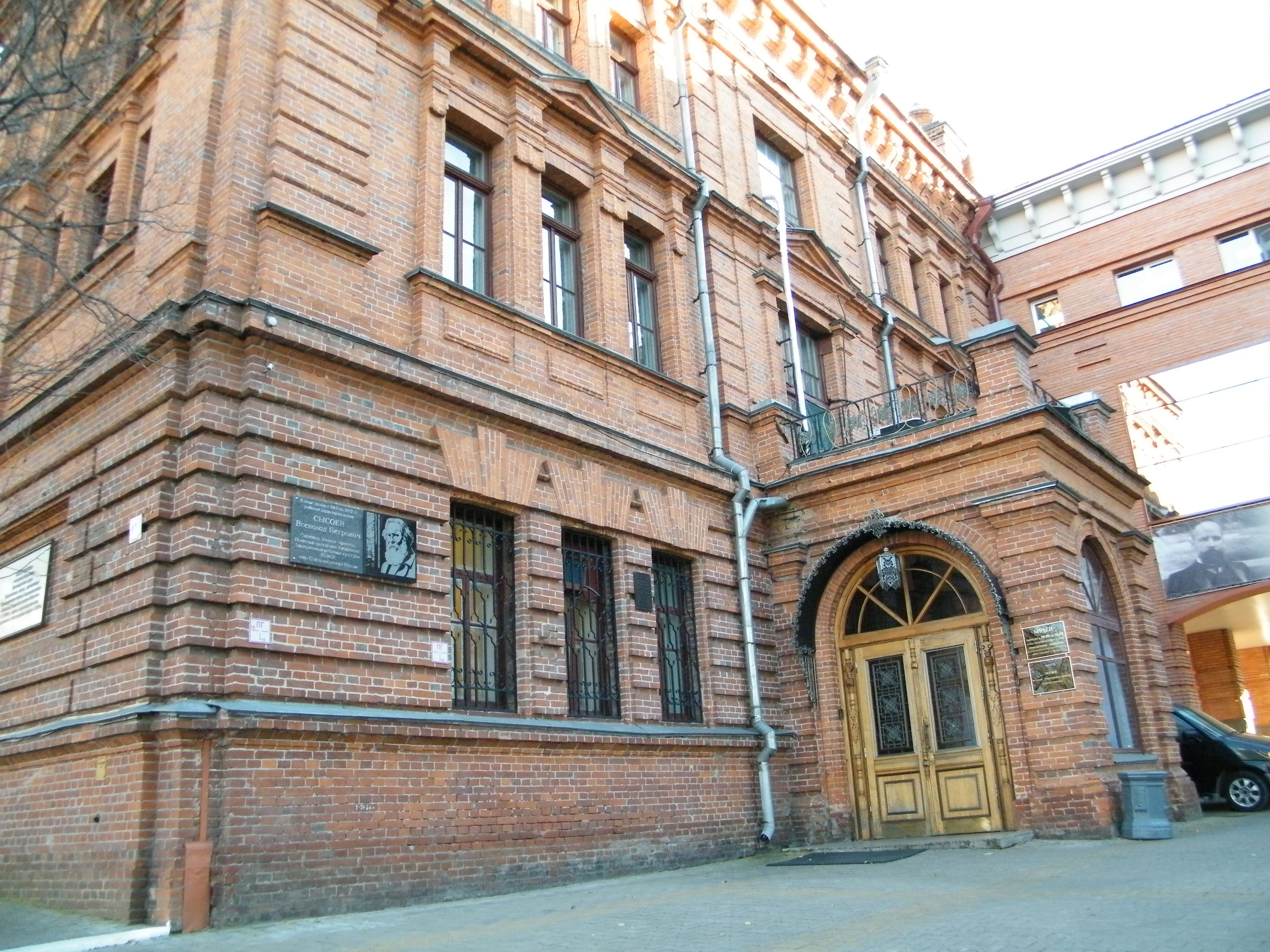 Хабаровский краевой музей имени Николая Ивановича Гродекова, вход